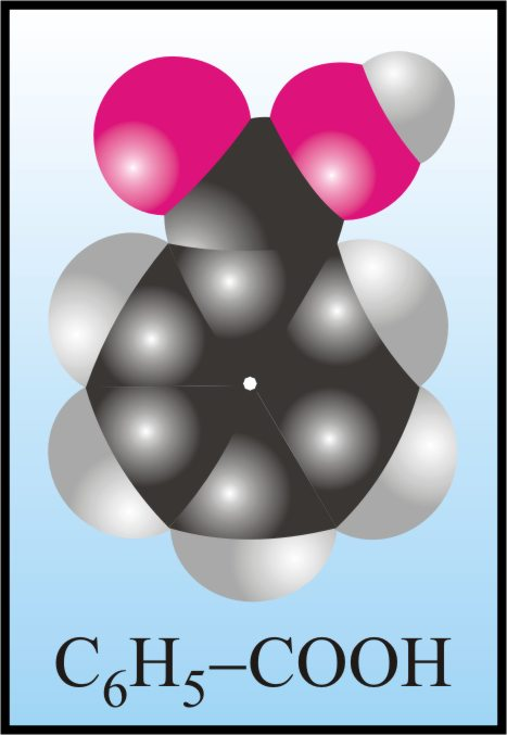 benzoic acid